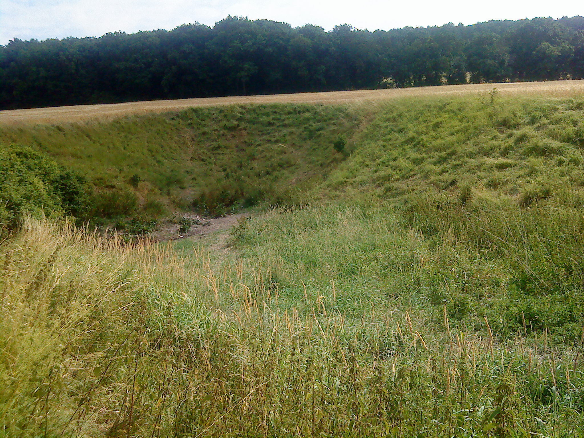 Die Karstquelle Kirschensoog (trocken gefallen) bei Wallmoden